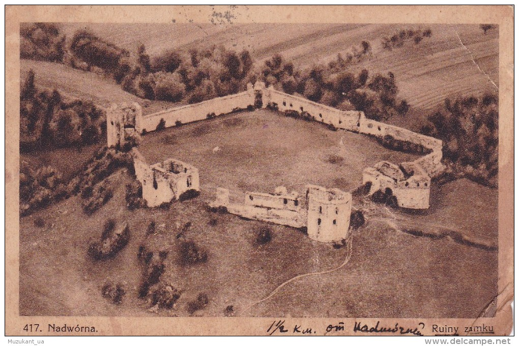 Руїни Пнівського замку